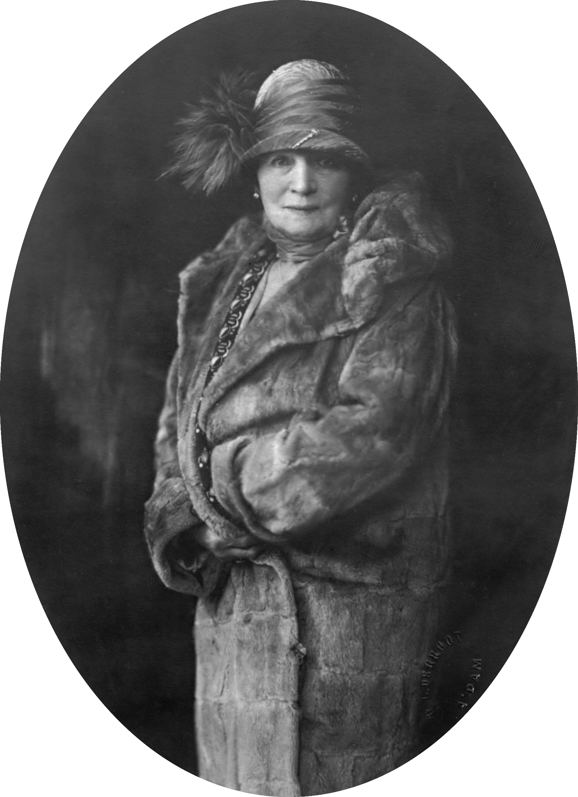 Theodora Mann-Bouwmeester, actrice, neemt afscheid van het toneel 1926